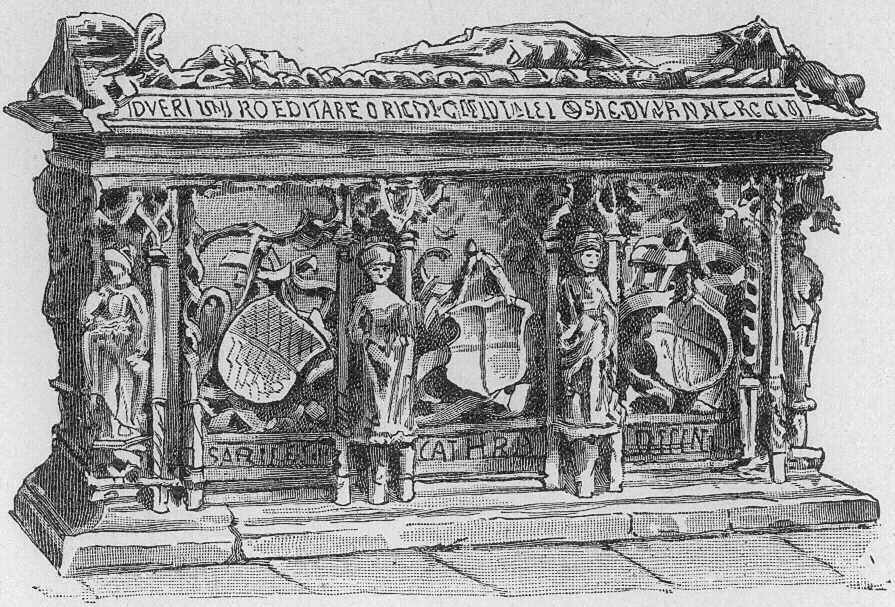 Grabmal der Kaiserin Editha im Magdeburger Dom